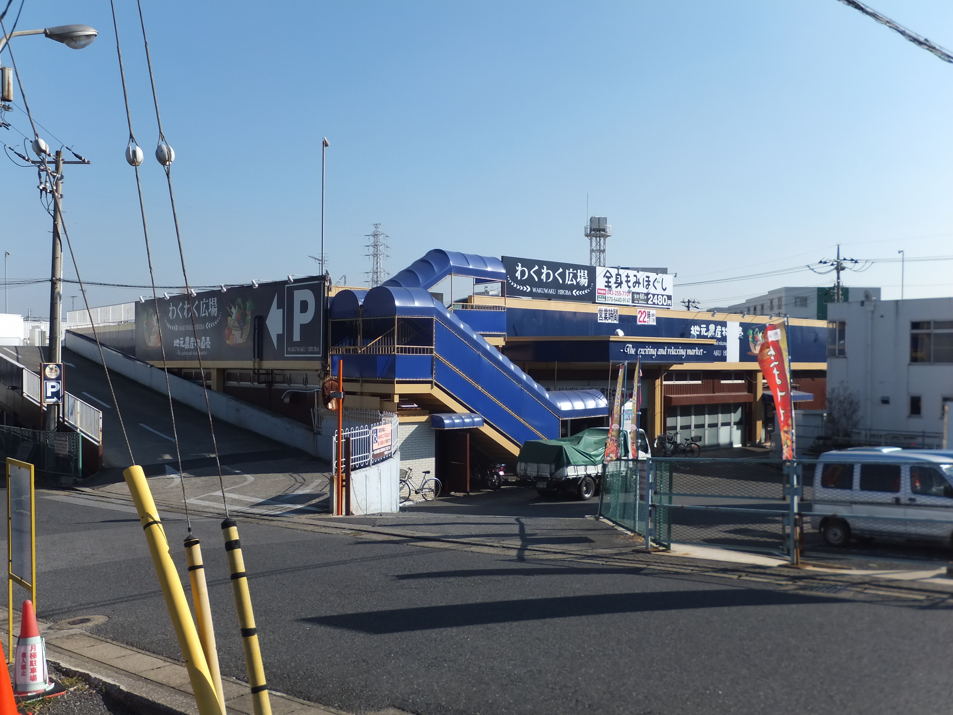 わくわく広場小仲台店（千葉市稲毛区）。株式会社タカヨシが経営する農作物直売所・スーパーマーケット